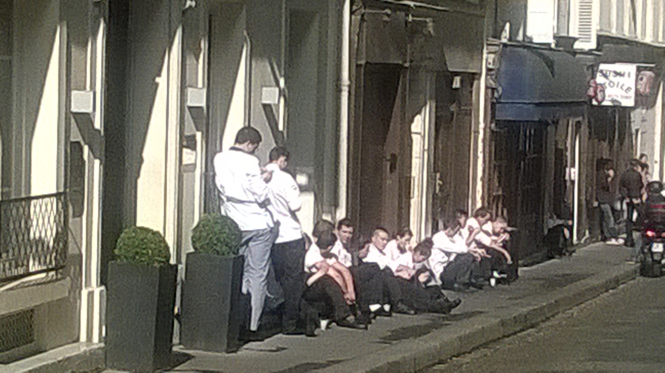 rue Troyon paris XVII la brigade de Guy Savoy (restaurant 3 étoiles) avant le "coup de feu"